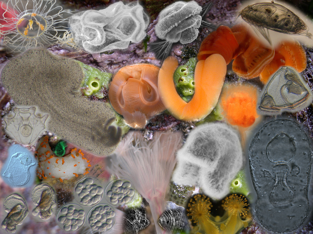 Montagem com os embriões, larvas e invertebrados estudados no curso de Embriologia Comparativa de Invertebrados em Friday Harbor Labs, 2006. Montage with embryos, larvae and invertebrates studied on the Comparative Invertebrate Embryology from Friday Harbor Labs, 2006.